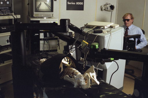 Der Herzchirurg Bruno Reichart steuert (für Testzwecke) einen Operationsroboter im Klinikum Großhadern (München)